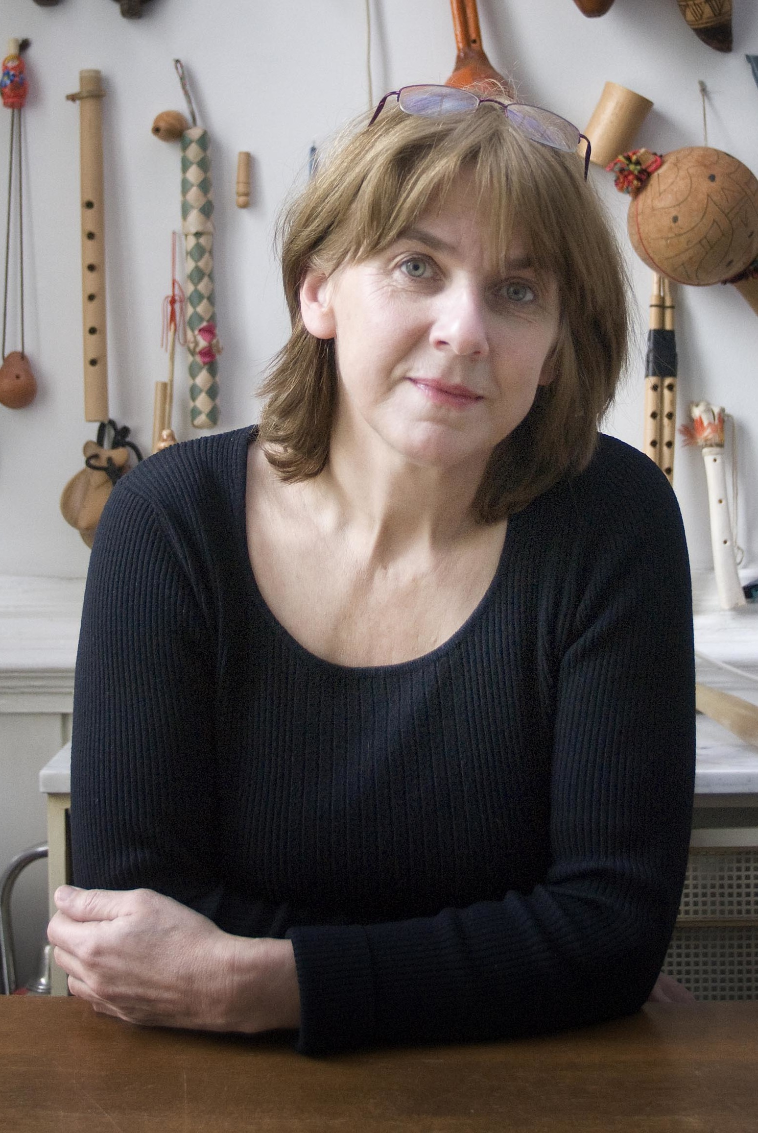 Joke van Leeuwen, schrijfster.